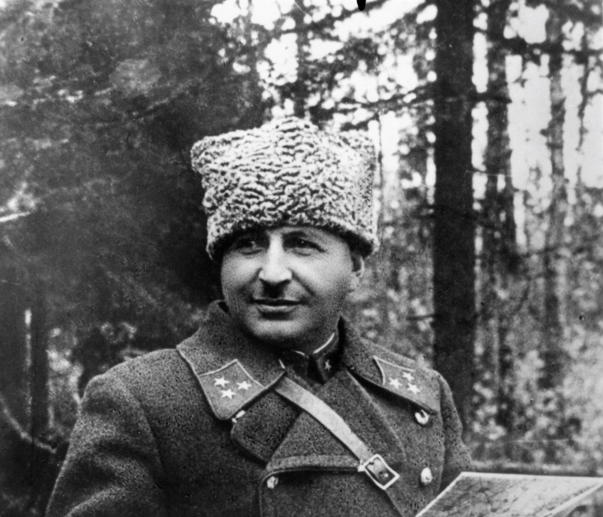 Начальник штаба Юго-Западного направления генерал-лейтенант И.Х. Баграмян